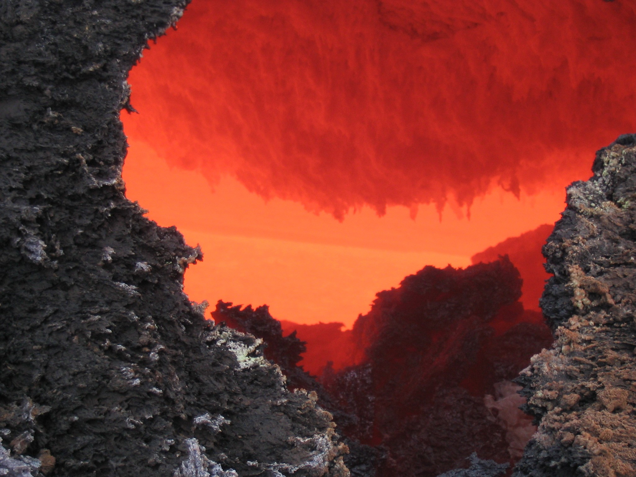 Magma incandescente in una grotta lavica dell'Etna